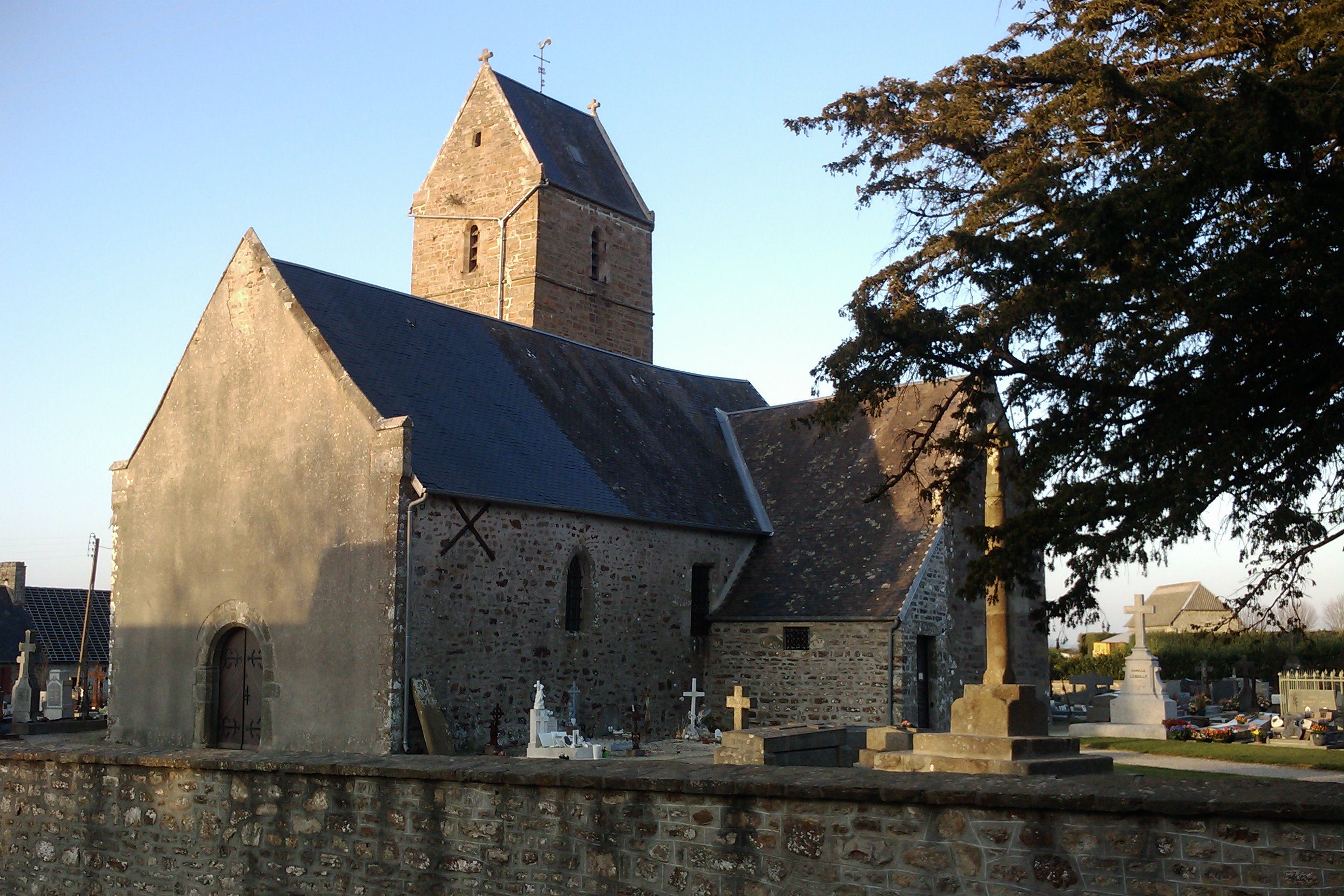 Église Notre-Dame de La Bloutière